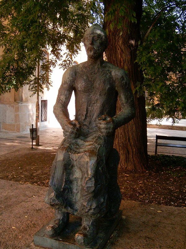 A városalapító Géza nagyfejedelem életnagyságú bronzszobra a Székesfehérváron a székesegyház szomszédságában. A szobrot Meszlényi János (1939-) készítette 1972-ben (Magony: Székesfehérvár szobrai, 1995)